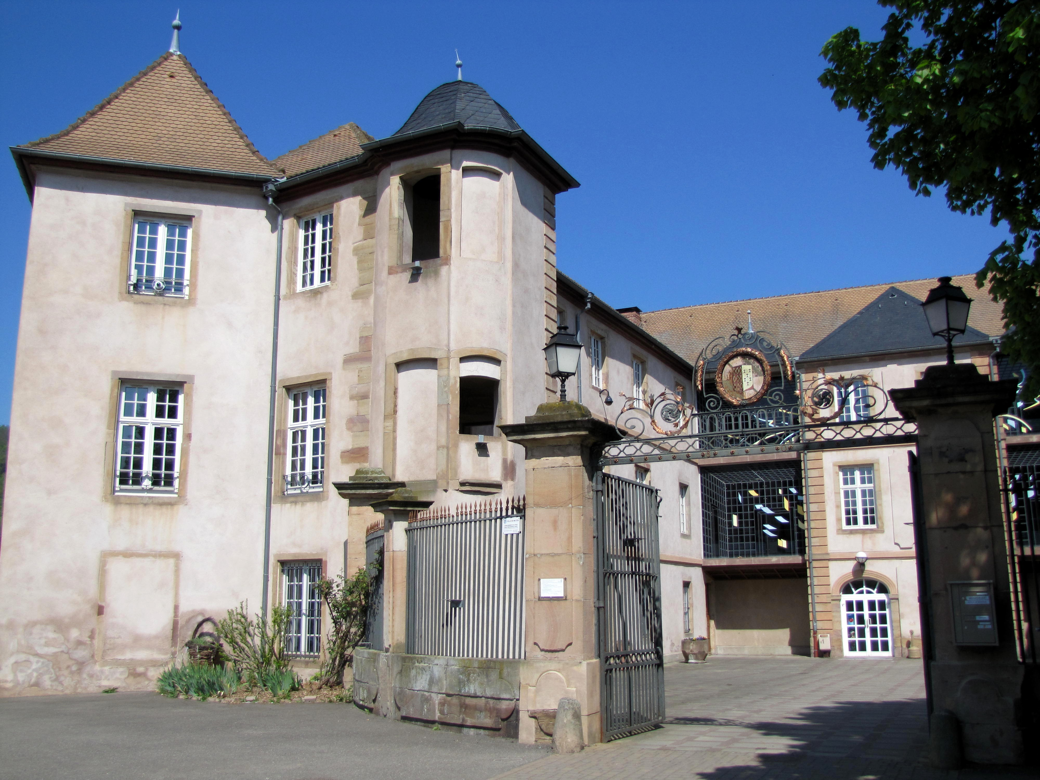 Alsace, Bas-Rhin, Mutzig, Château épiscopal dit château des Rohan (PA00084814, IA67011487).